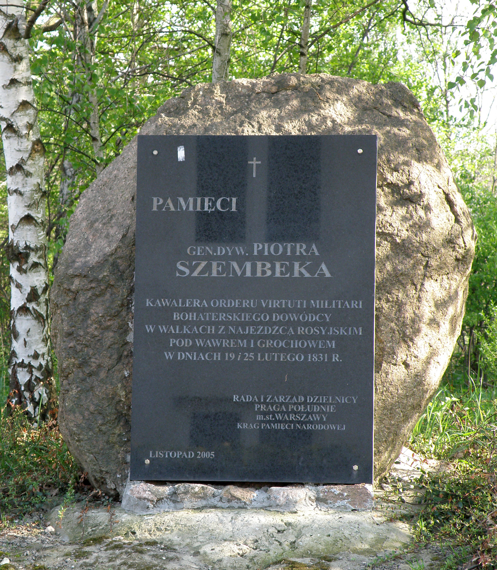 Olszynka Grochowska - Aleja Chwały, ul. Traczy